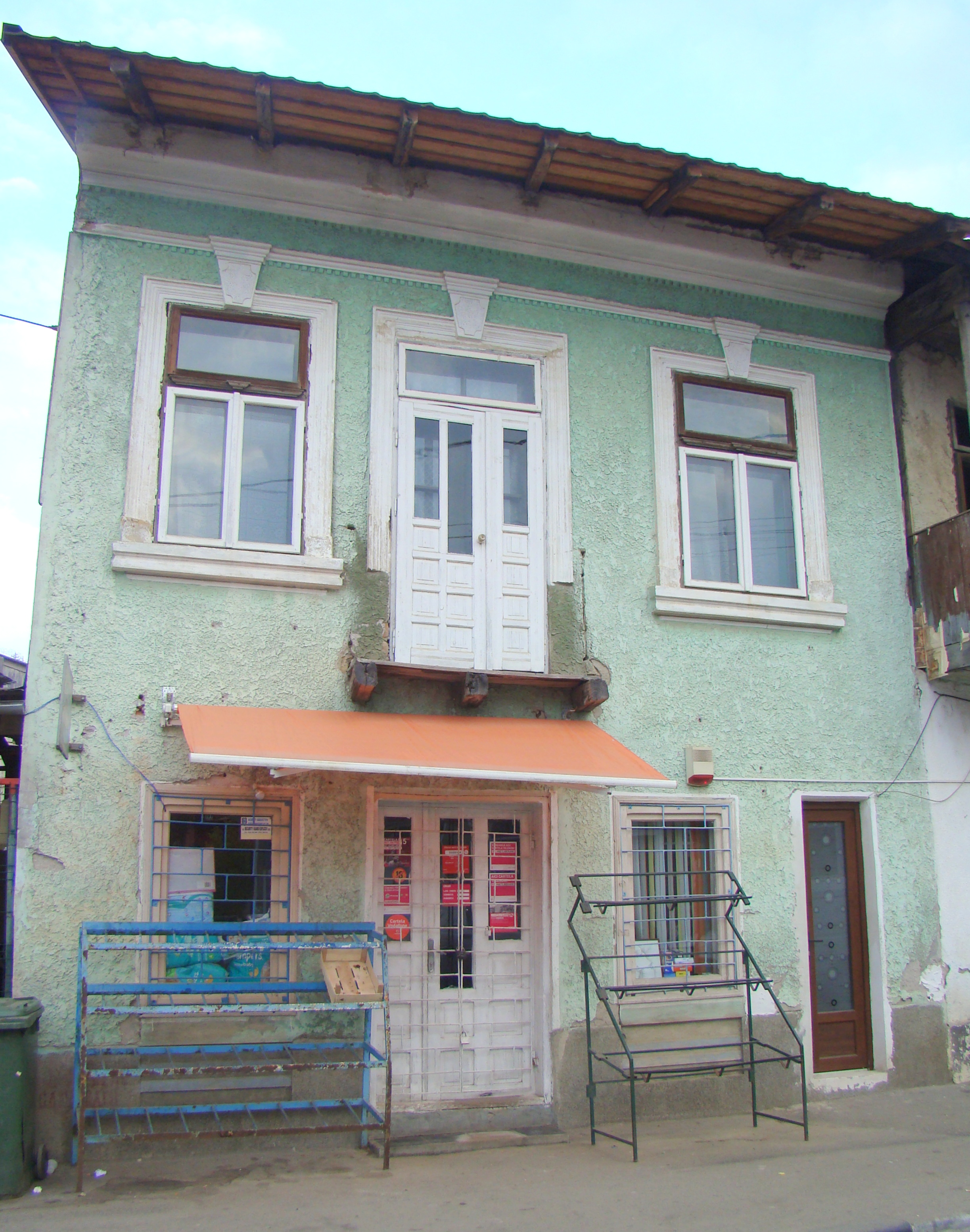 Casă, oraș Baia de Aramă, str. Republicii 3 1901